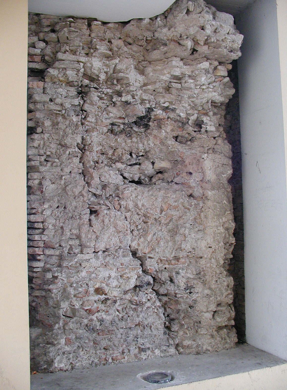 Eine kleiner Rest der alten Hausmauer vom Museum